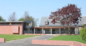 Façade du musée de l'horlogerie